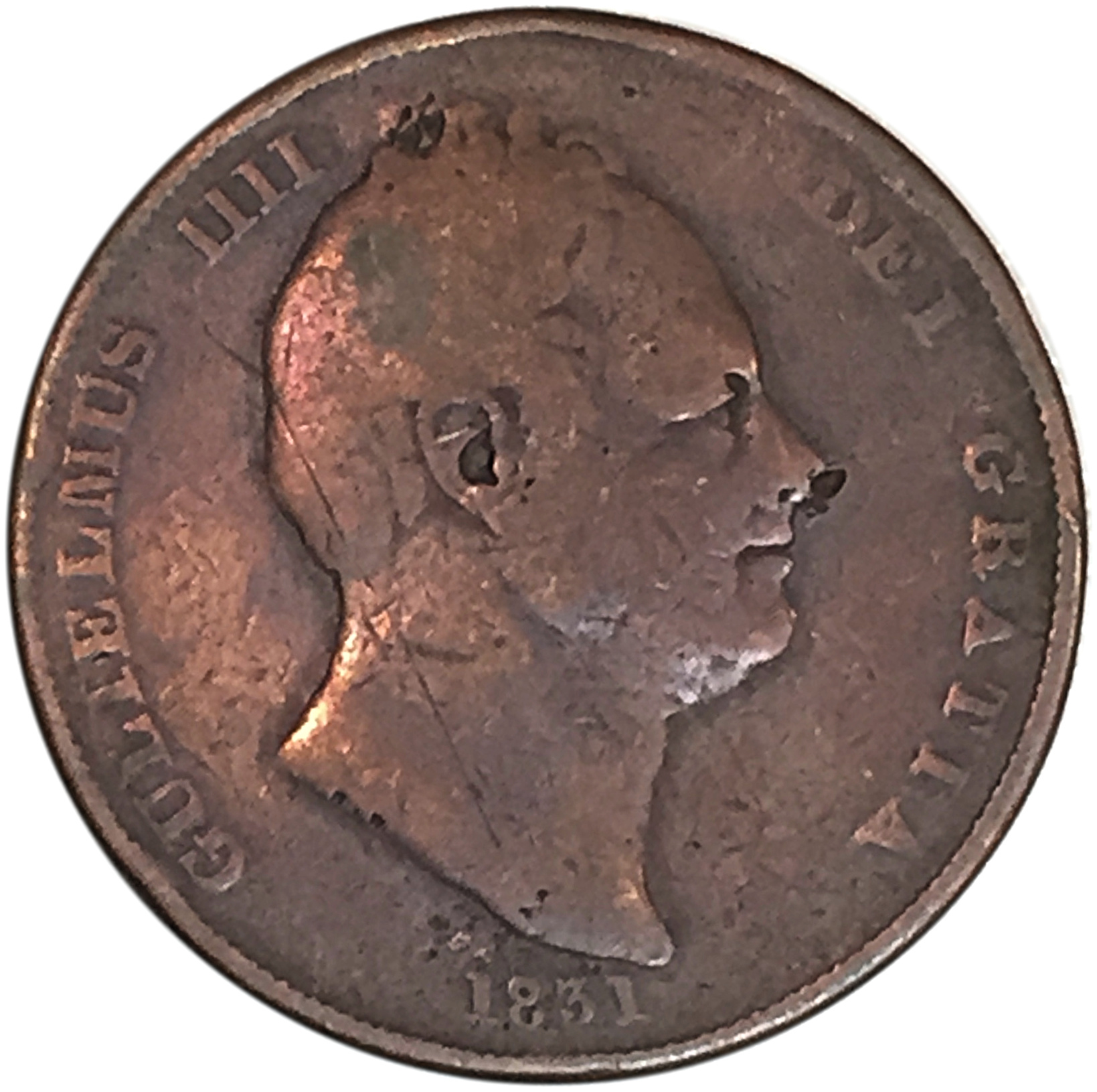 1831 William IV penny